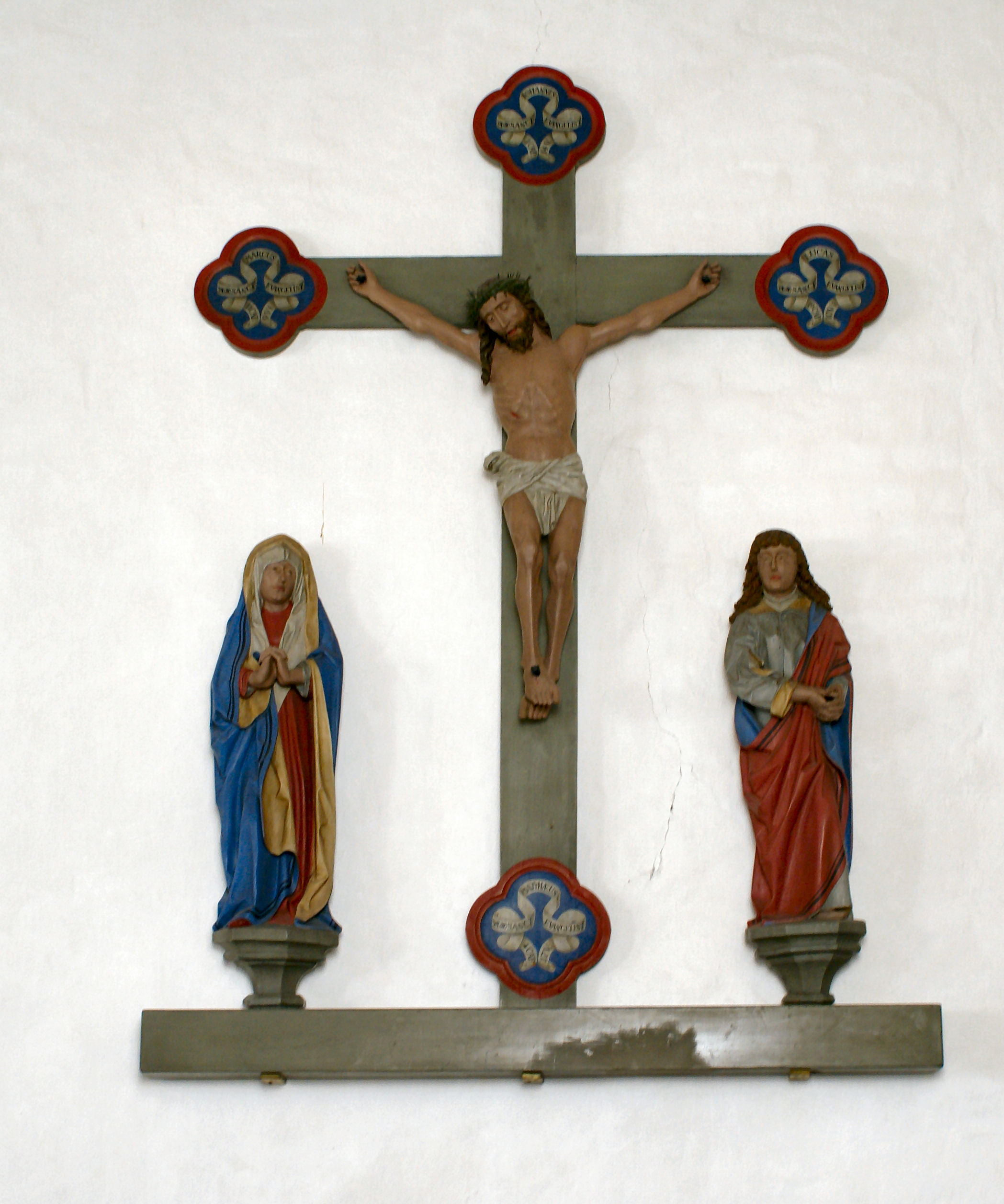 Hald Kirke, krucifiks